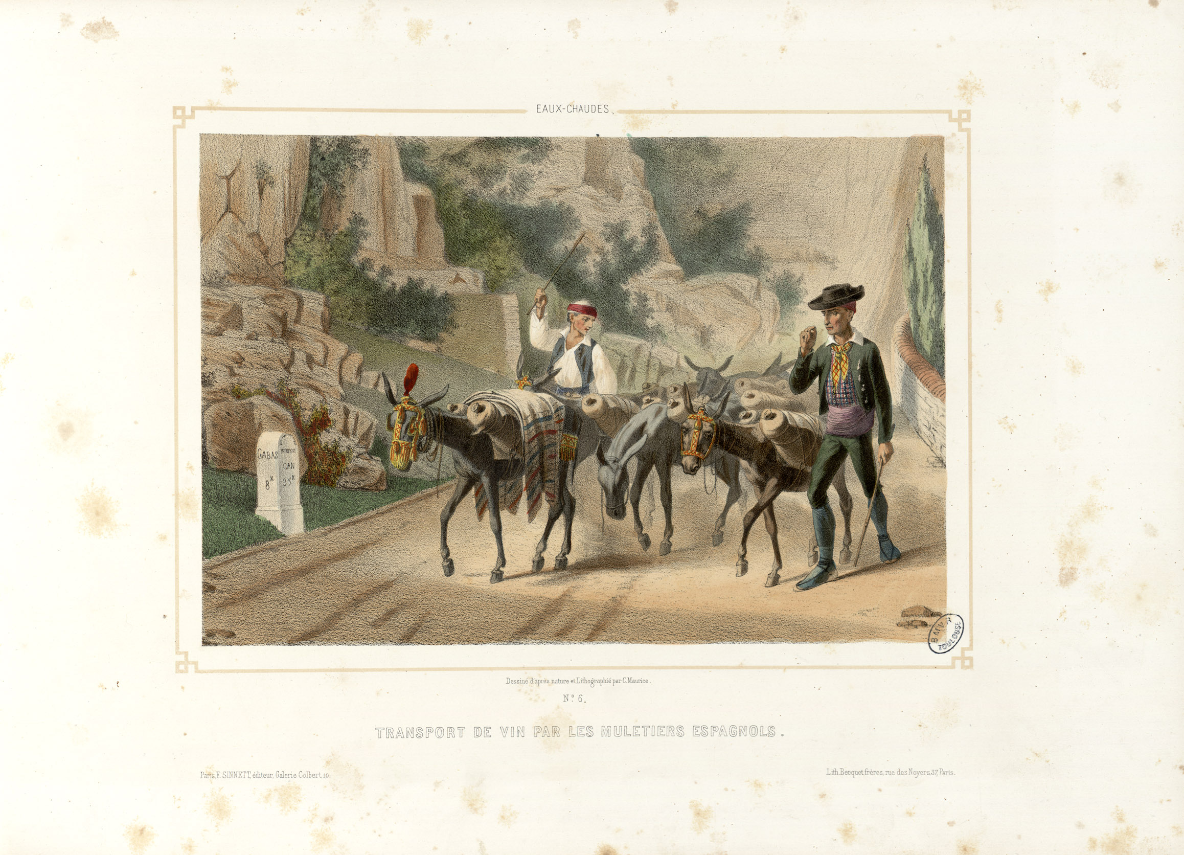 Titre calligraphié et illustré à l'encre sur feuille de calque Fait partie de deux albums réunis et publiés par F. Sinnett à Paris. Lith. de Becquet frères à Paris. Les planches du premier album ont été dessinées par Montaut et lithographiées par Bargue. Les planches du second album ont été dessinées et lithographiées par Charles Maurice. Le titre du premier album est lithographié. Le premier album est signalé dans la bibliographie pyrénéiste de Jacques Labarère comme étant très rare. Pièce jointe : photocopie en n. et b. d'une lithographie de Montaut intitulée "[Col de Tortes - Traversée de la montagne]". Ancely, René (1876 - 1966). Possesseur